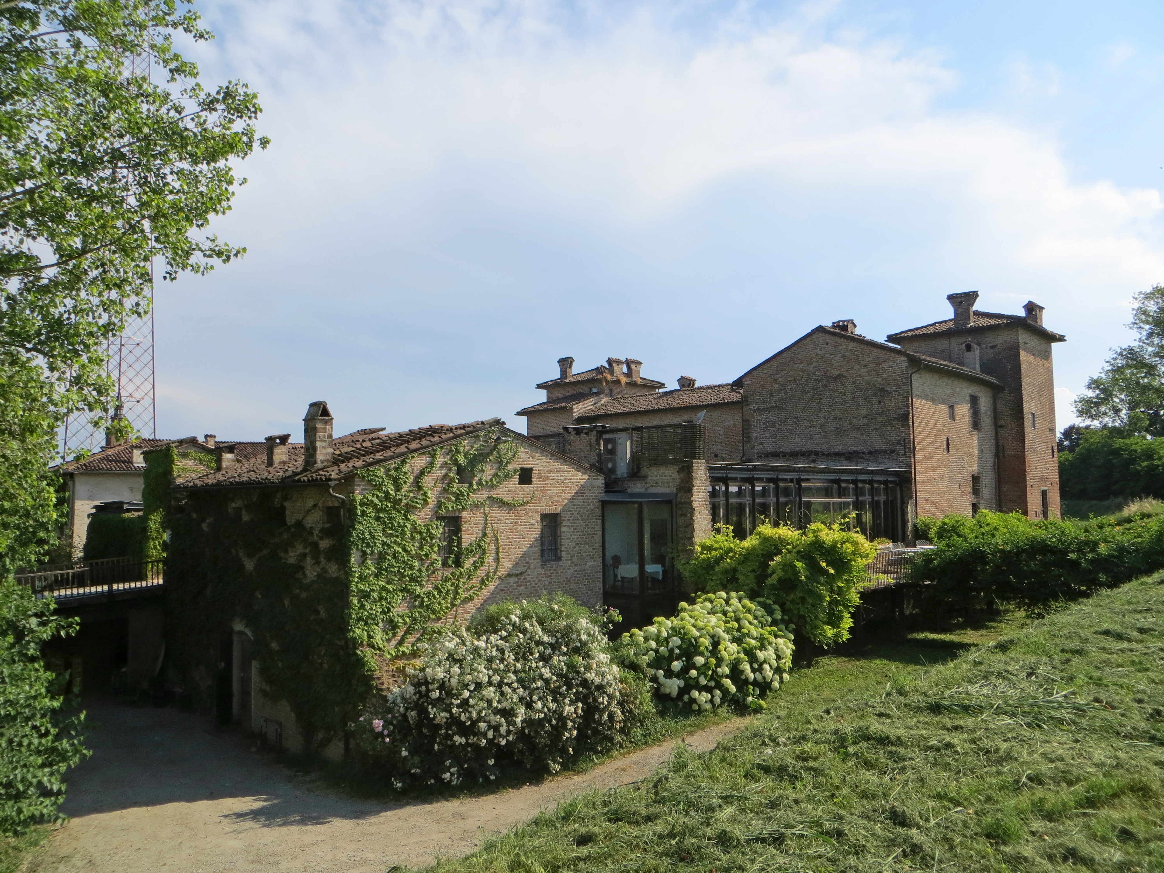 Antica Corte Pallavicina (Polesine Parmense) - lato nord